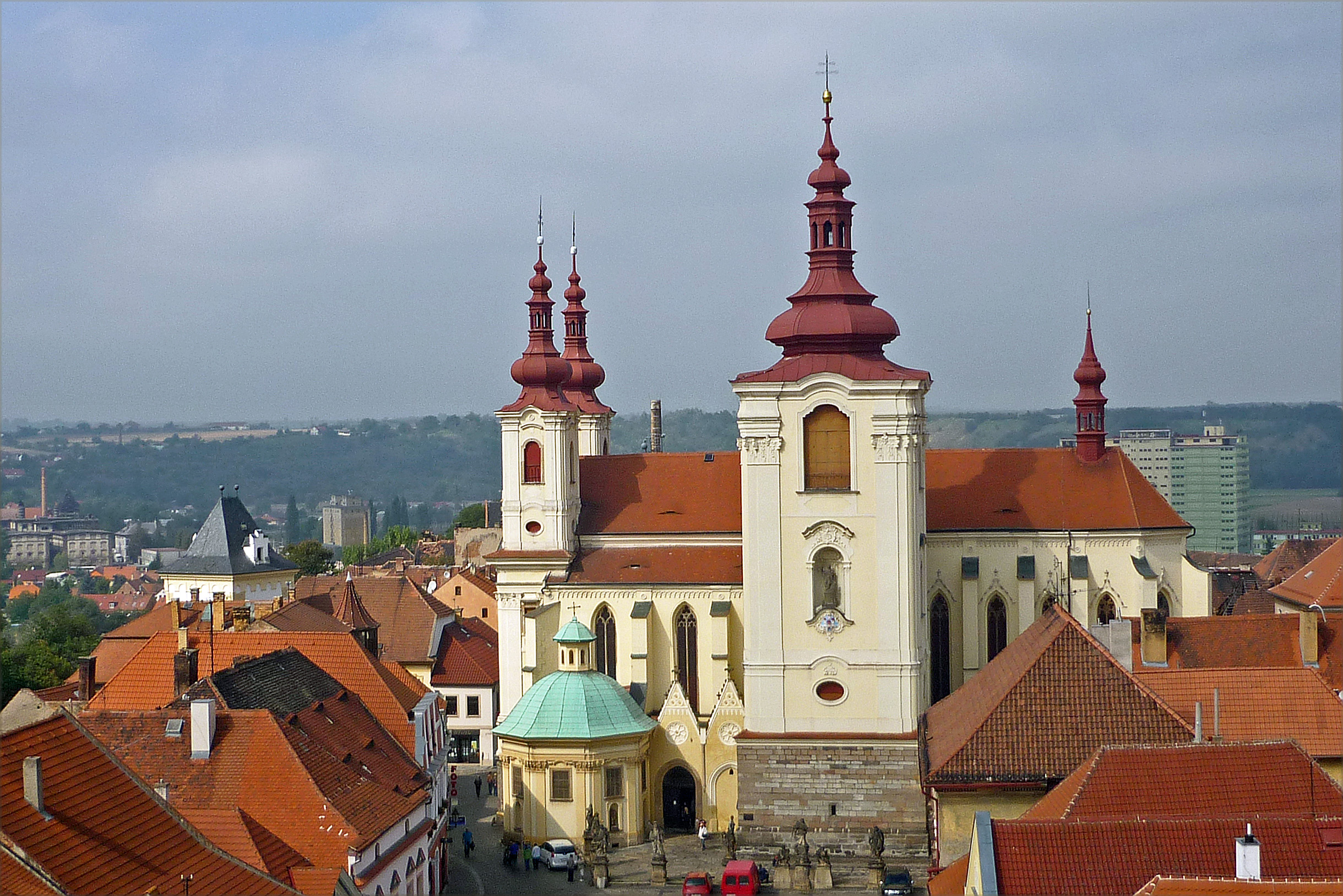 Saaz/Žatec, Blick vom Rathausturm auf die Dekanatskirche Mariä Himmelfahrt